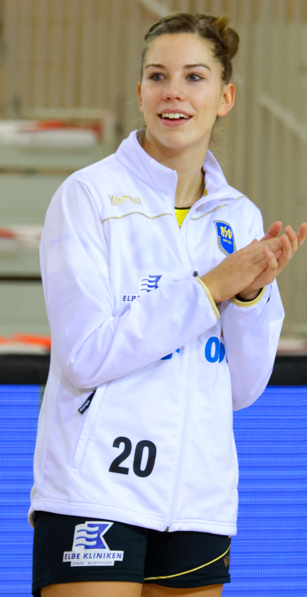 Rencontre du 3e tour de la Coupe des Vainqueurs de Coupe. A Issy Les Moulineaux, le 22 novembre 2015.